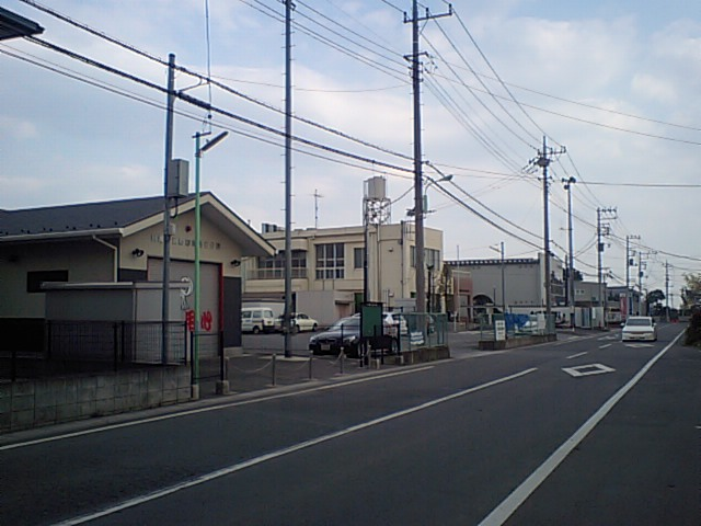 埼玉県川越市今泉・川越市役所南古谷出張所付近